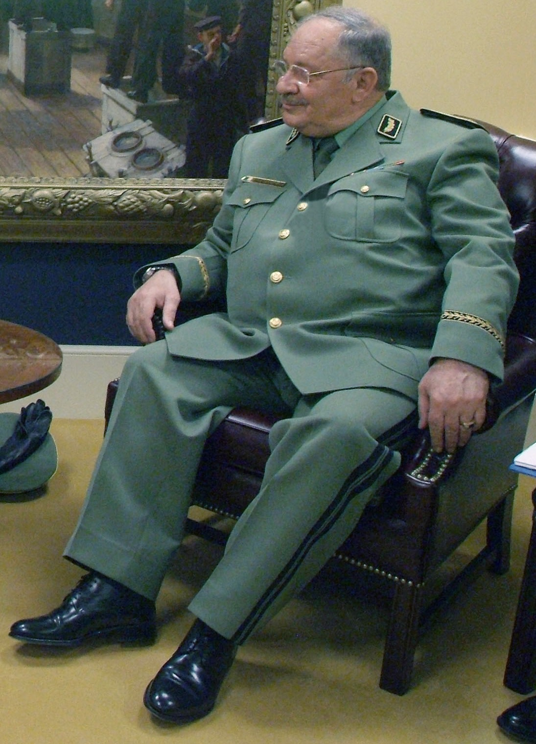 Le général Gaïd Salah, chef d'État Major de l'Armée algérienne en visite aux États-Unis d'Amérique